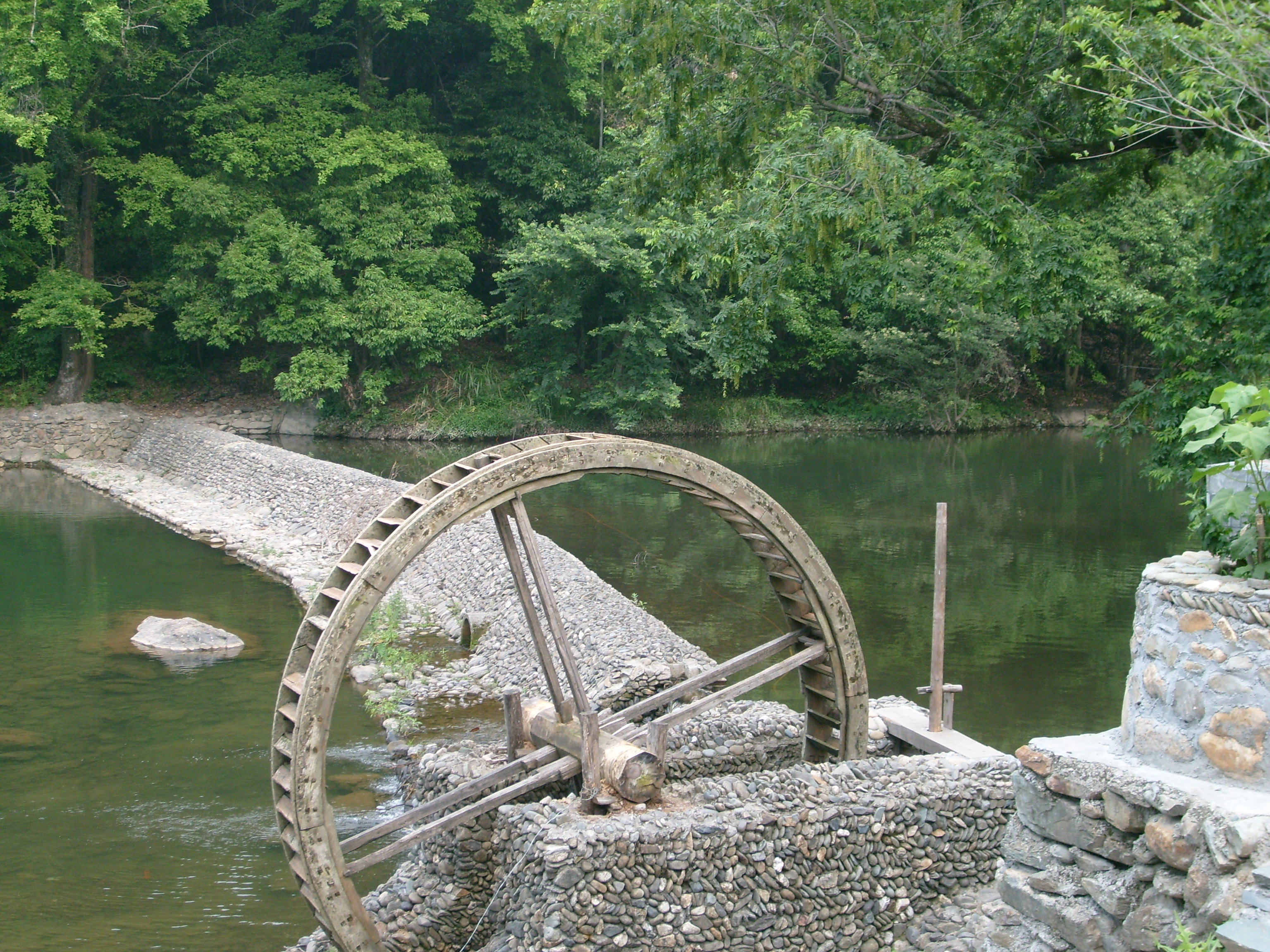 江西省鄉村的水車（複製品）